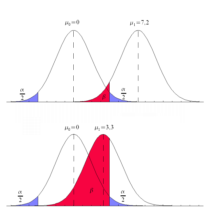 Darstellung der Abhängigkeit des Fehlers zweiter Art von dem Wert des unbekannten Parameters